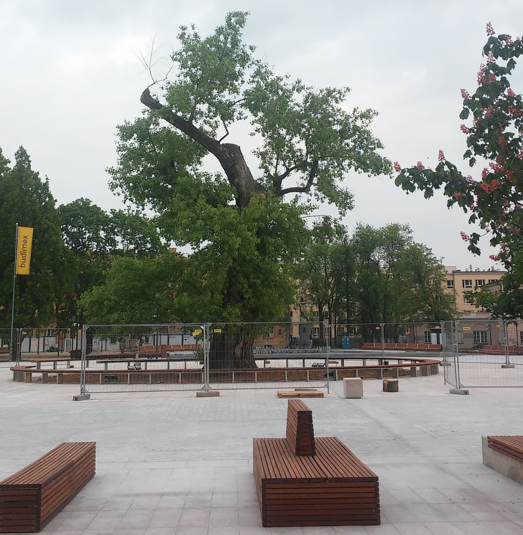 Zdjęcie wykonane tuż przed wycinaniem.